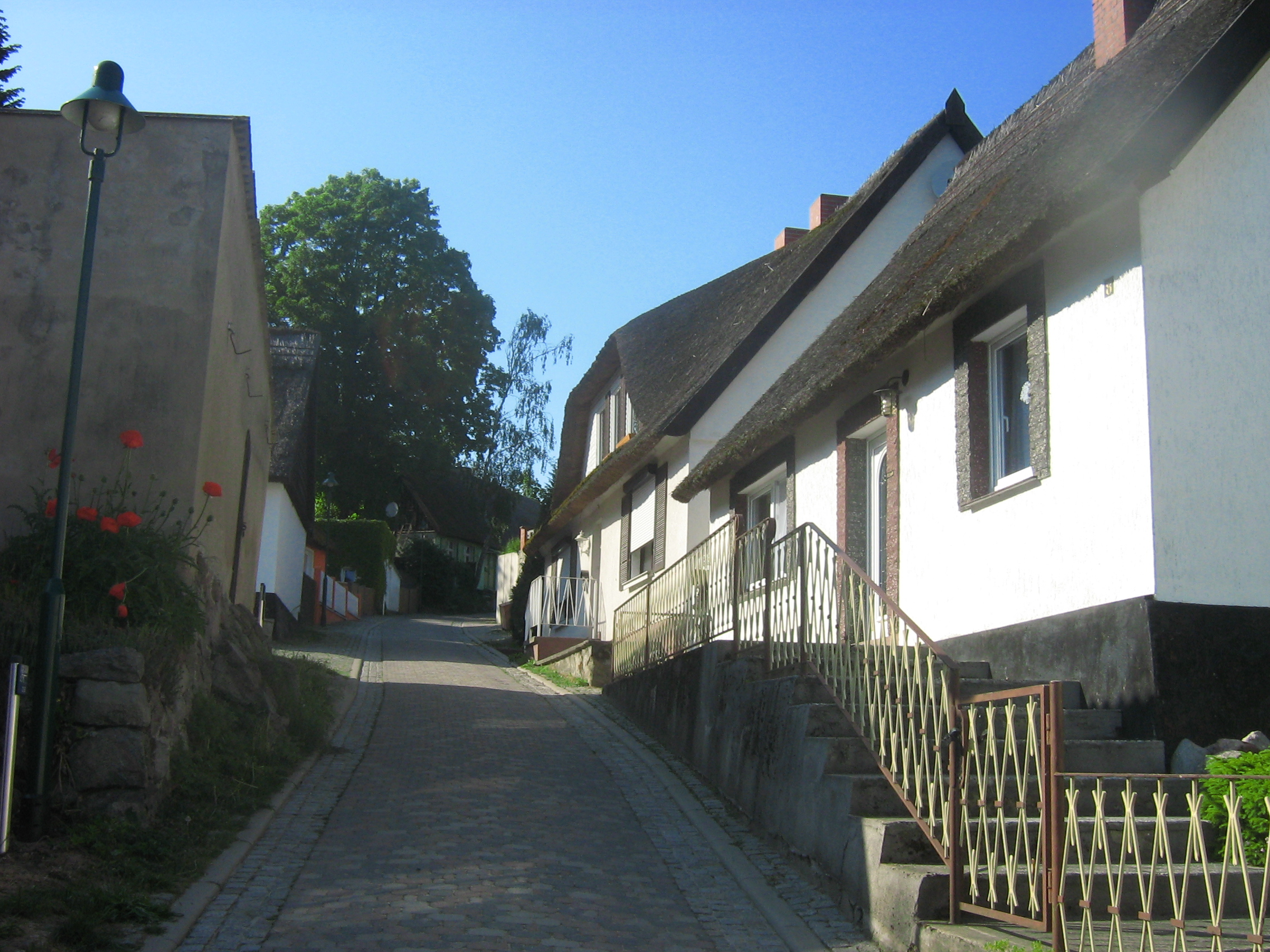 Kamminke